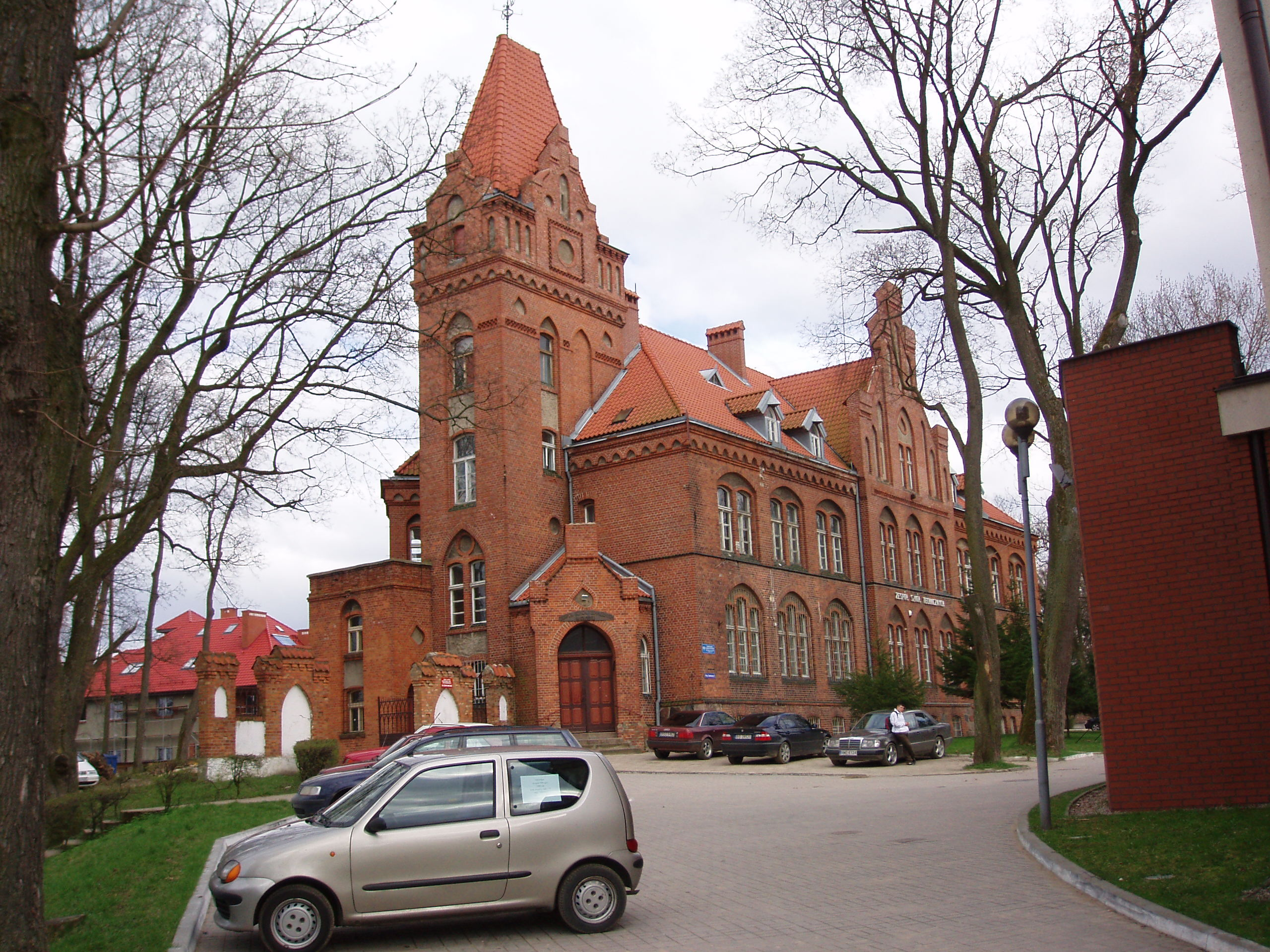 Olecko - starostwo wraz z terenem dawnego zamku (obecnie szkoła) z 1897 r